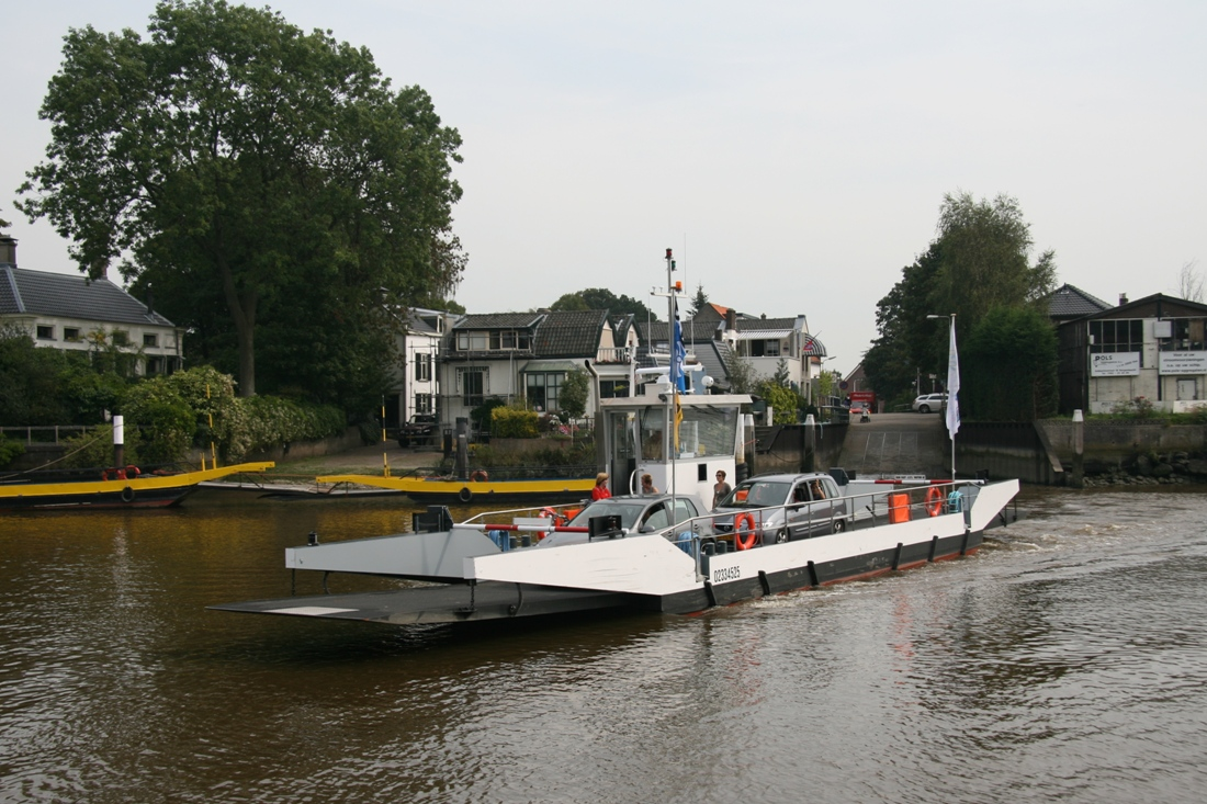 De nieuwe veerpont die de twee oude kopladers heeft vervangen.